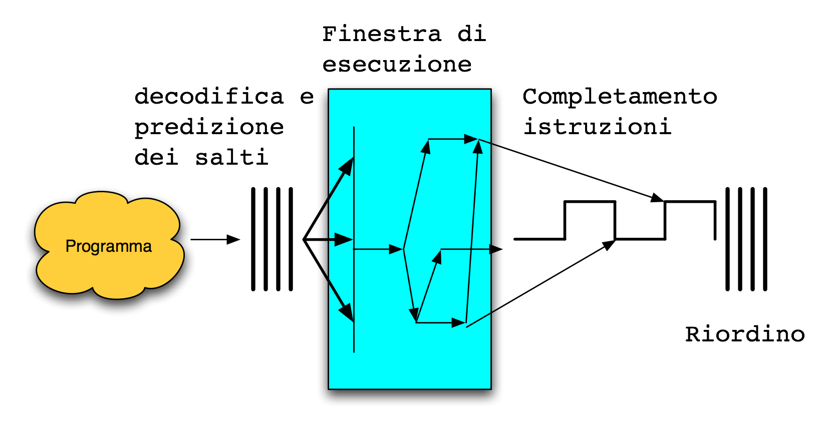 Schema generico di un processore superscalare